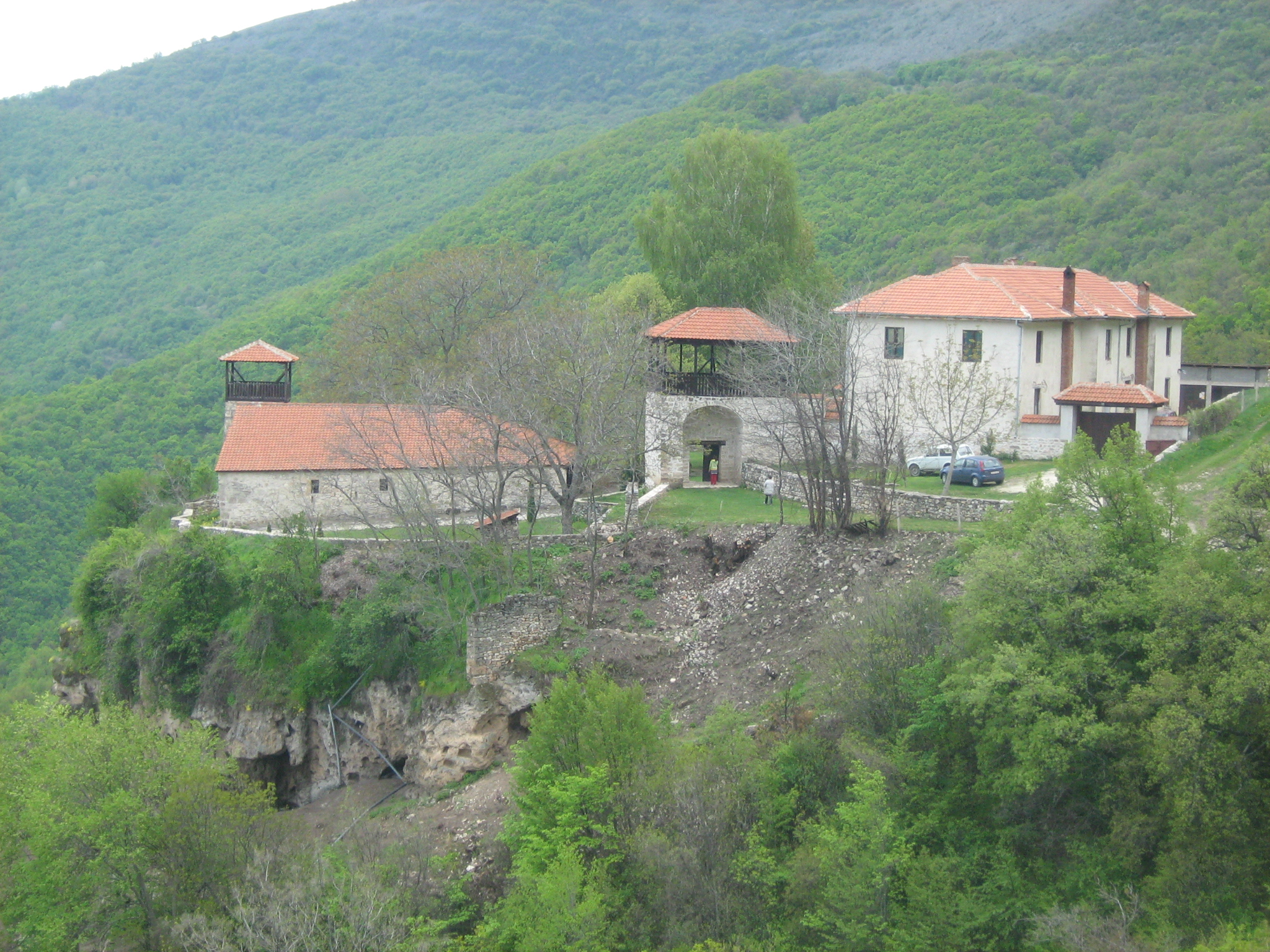 Манастир „Свето Преображение“, Зързе.